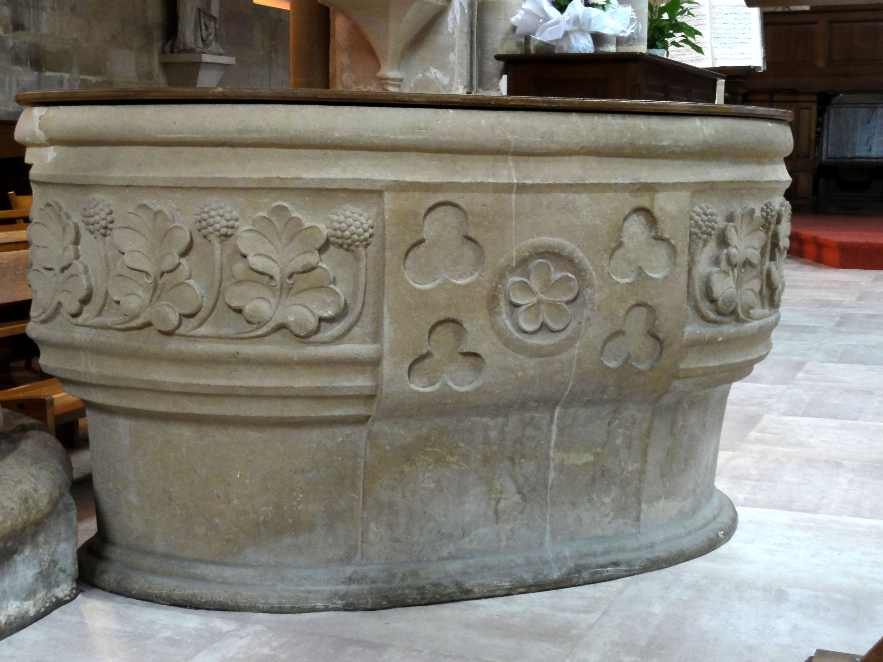 Fonts baptismaux du XVIe siècle (CMH).